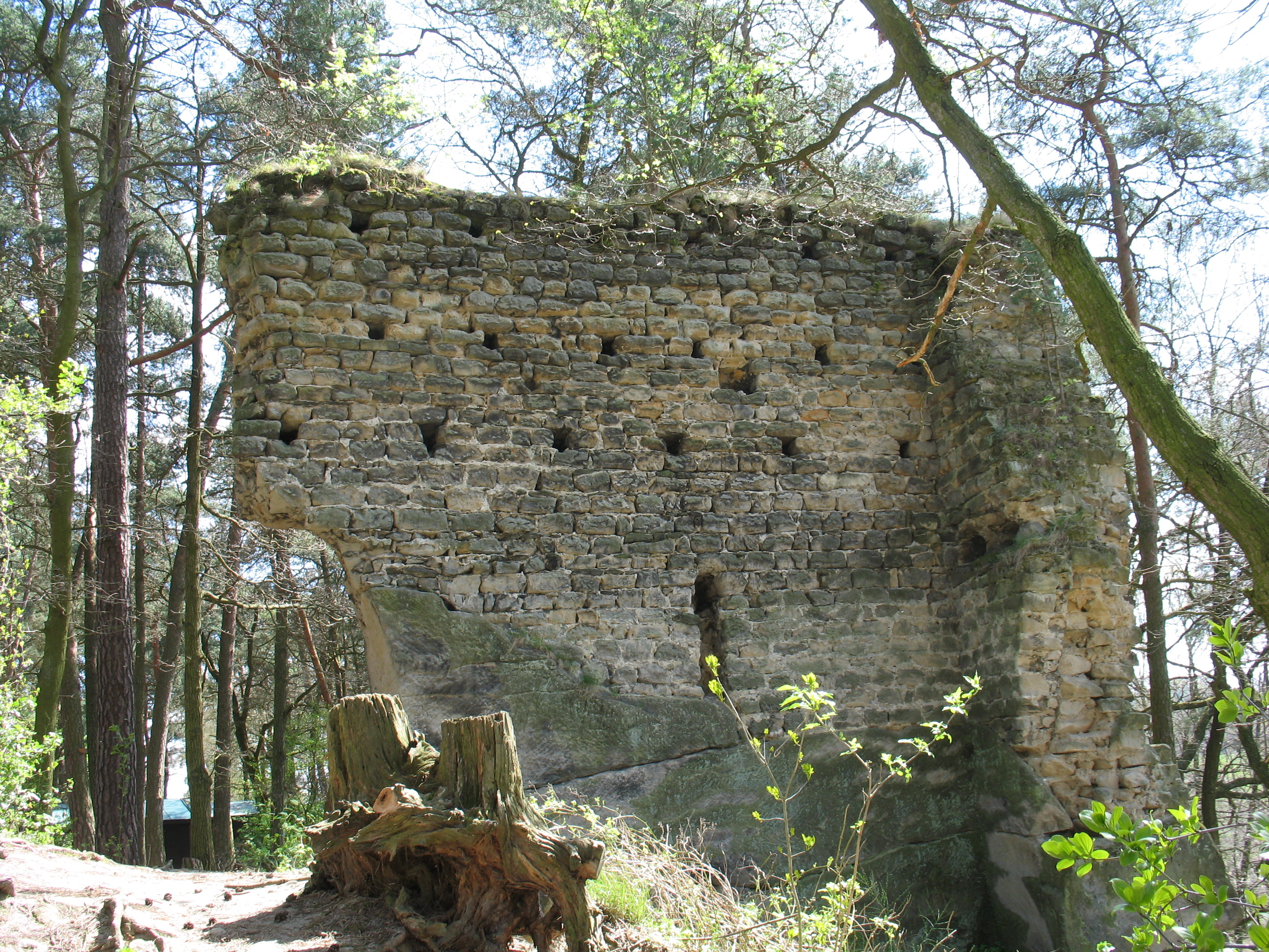 Zřícenina hradu Milčany (Vítkovce) mezi Bobřím potokem a Milčanským rybníkem